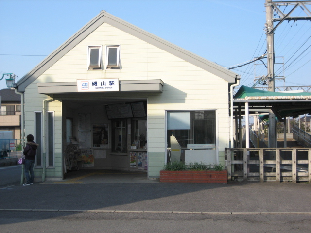 磯山駅